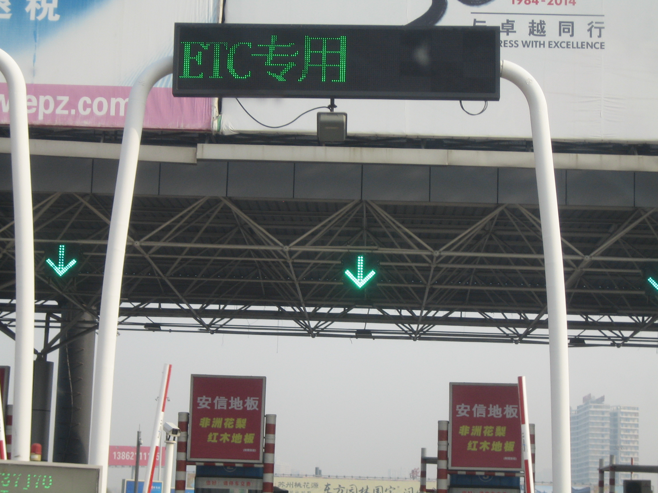 中文（中国大陆）: 中国大陆的ETC车道